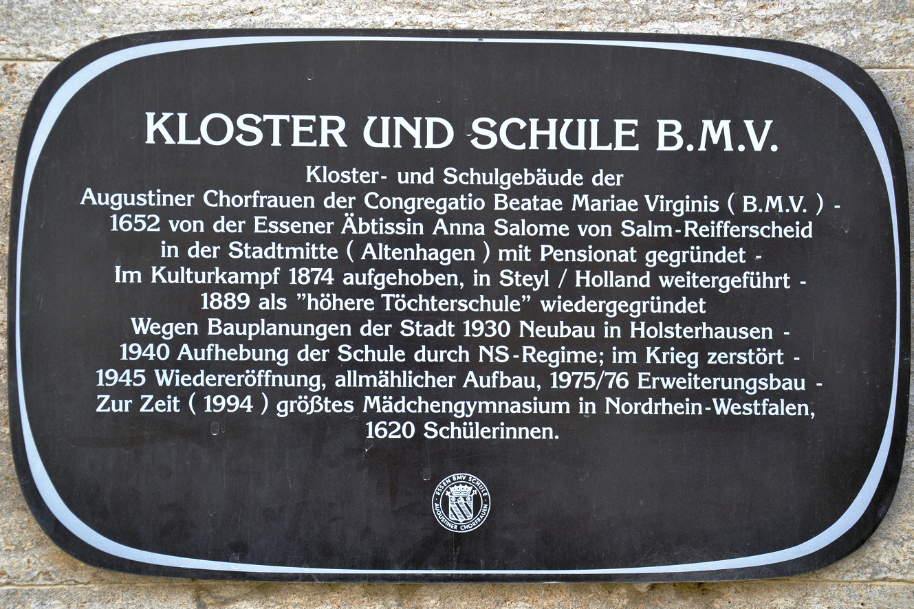 Gedenktafel an der B.M.V.-Schule in Essen-Holsterhausen, staatlich anerkanntes katholisches Mädchengymnasium in der Trägerschaft der Augustiner Chorfrauen der Congregatio Beatae Mariae Virginis (BMV)